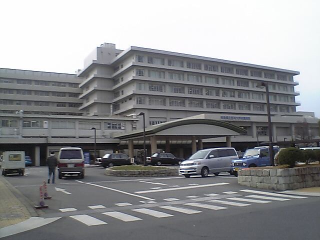 奈良県立医科大学附属病院です。2006年撮影、M7による撮影